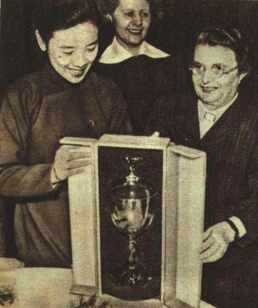 1951年国际民主妇女联合会第四届理事会会议 捷克妇联送给中华妇联 陆璀